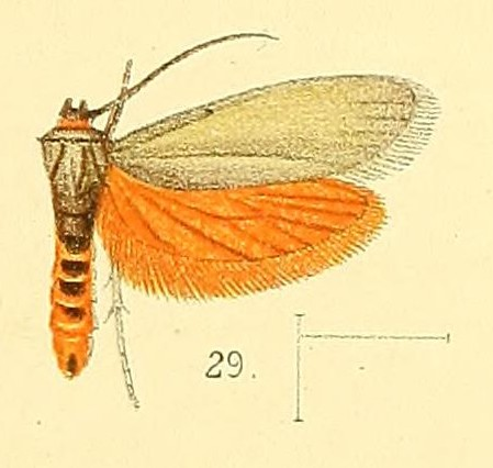 Gymnogramma hutchinsoni